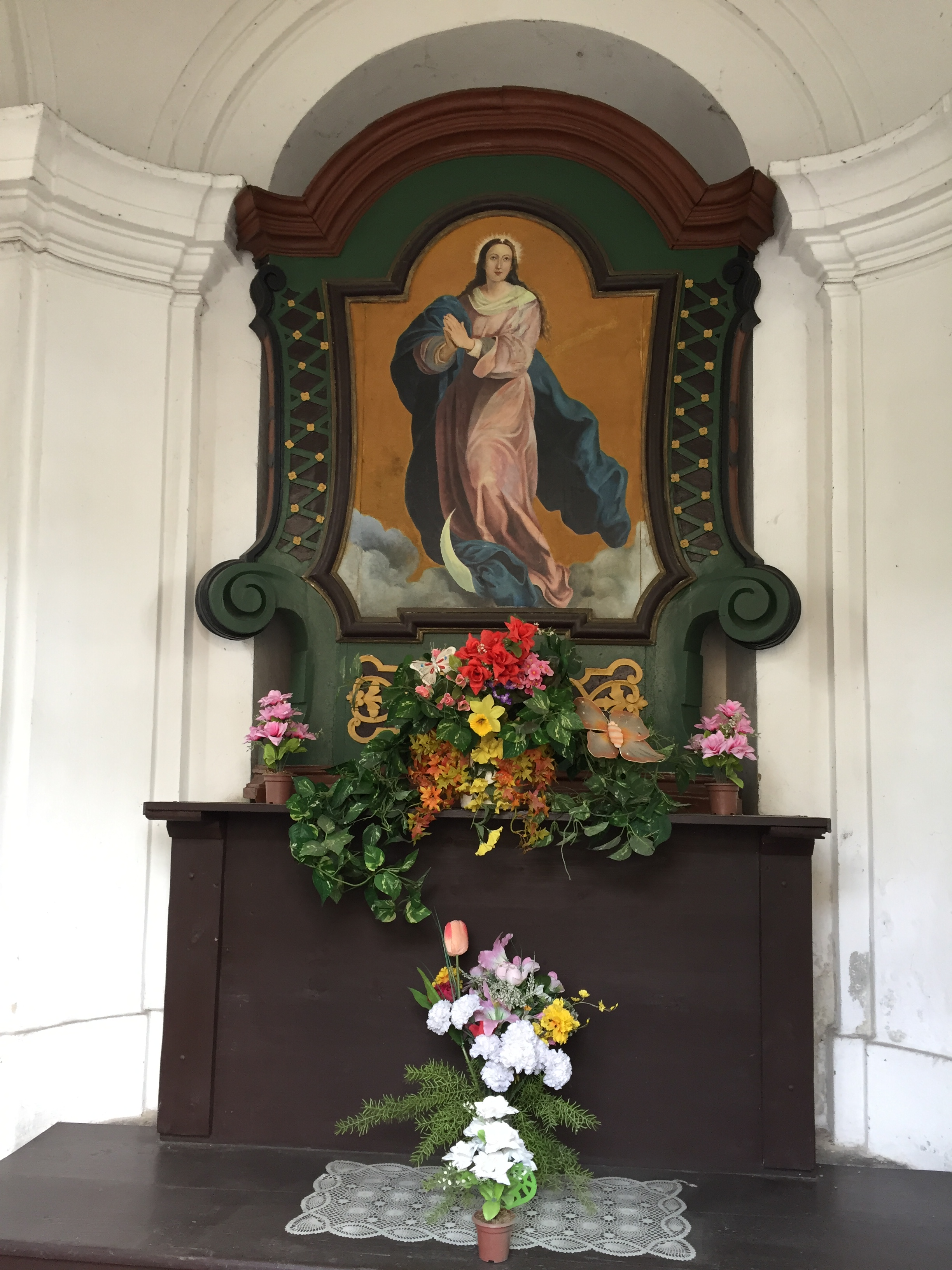 Děčín, kaple Panny Marie Pomocné - interiér, oltář